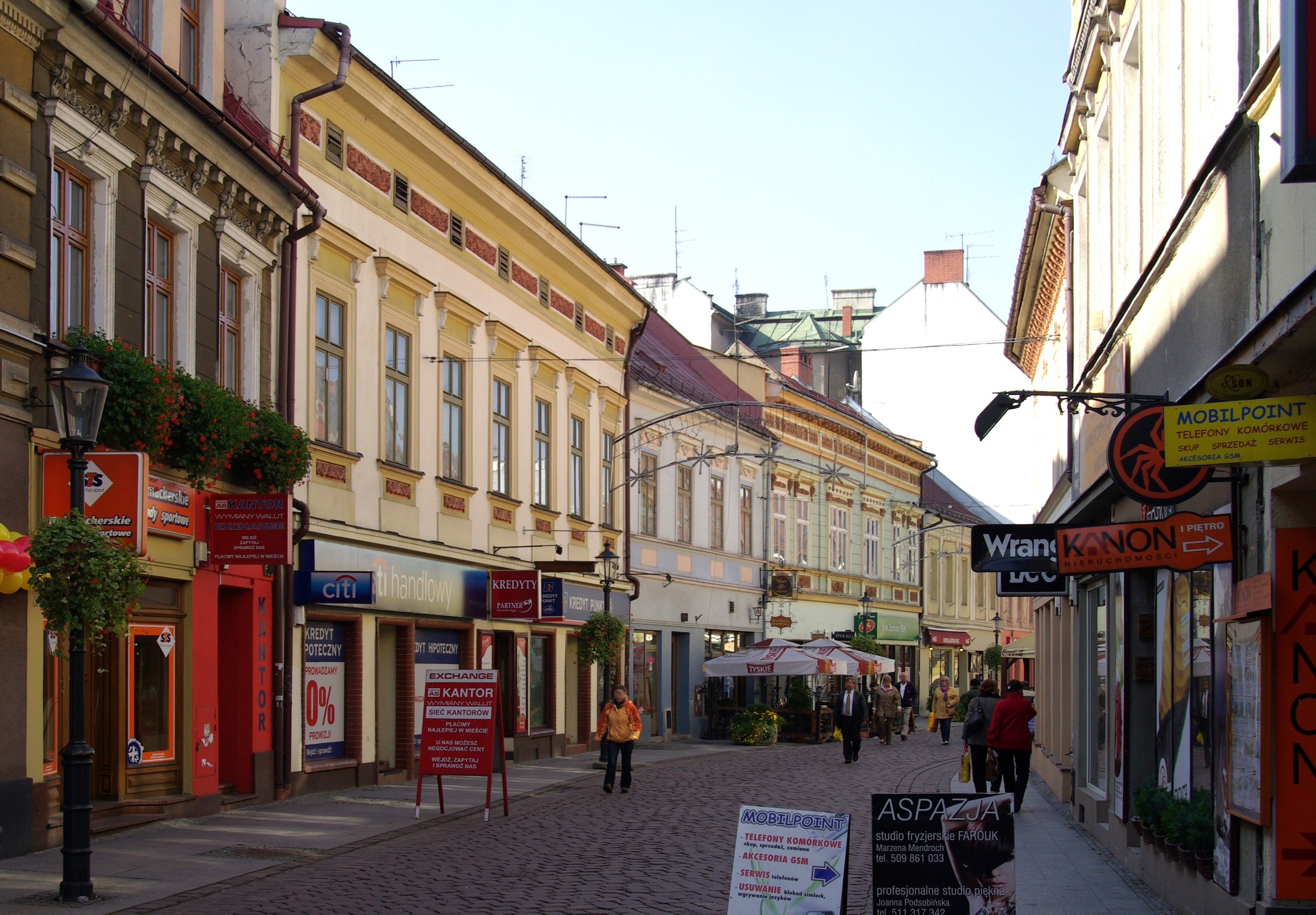 Bielsko-Biała, Ulica 11 Listopada 30-24